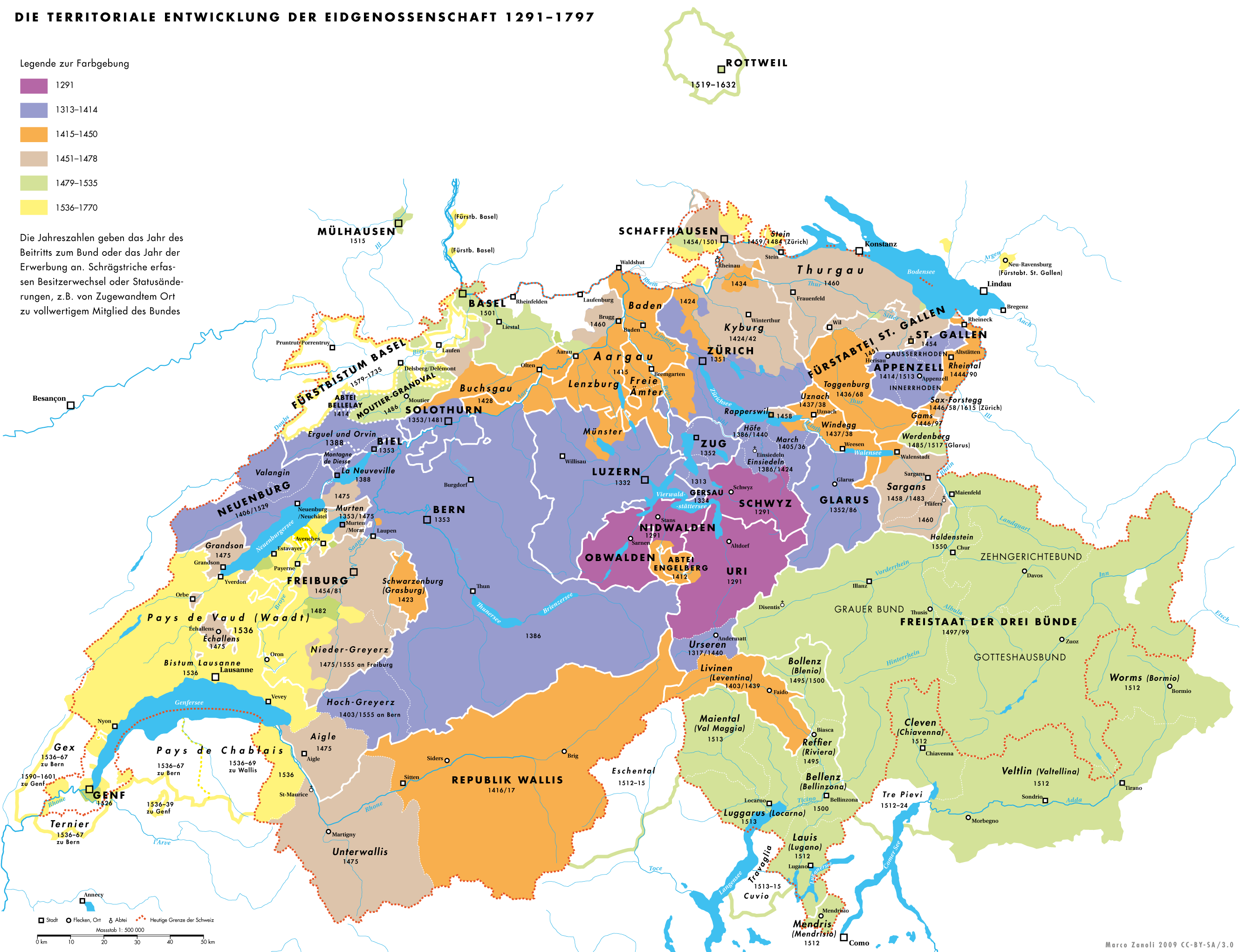 Die Territoriale Entwicklung der Eidgenossenschaft 1291–1797 (nach Adolf Gasser und Ernst Keller, vereinfachte Version).